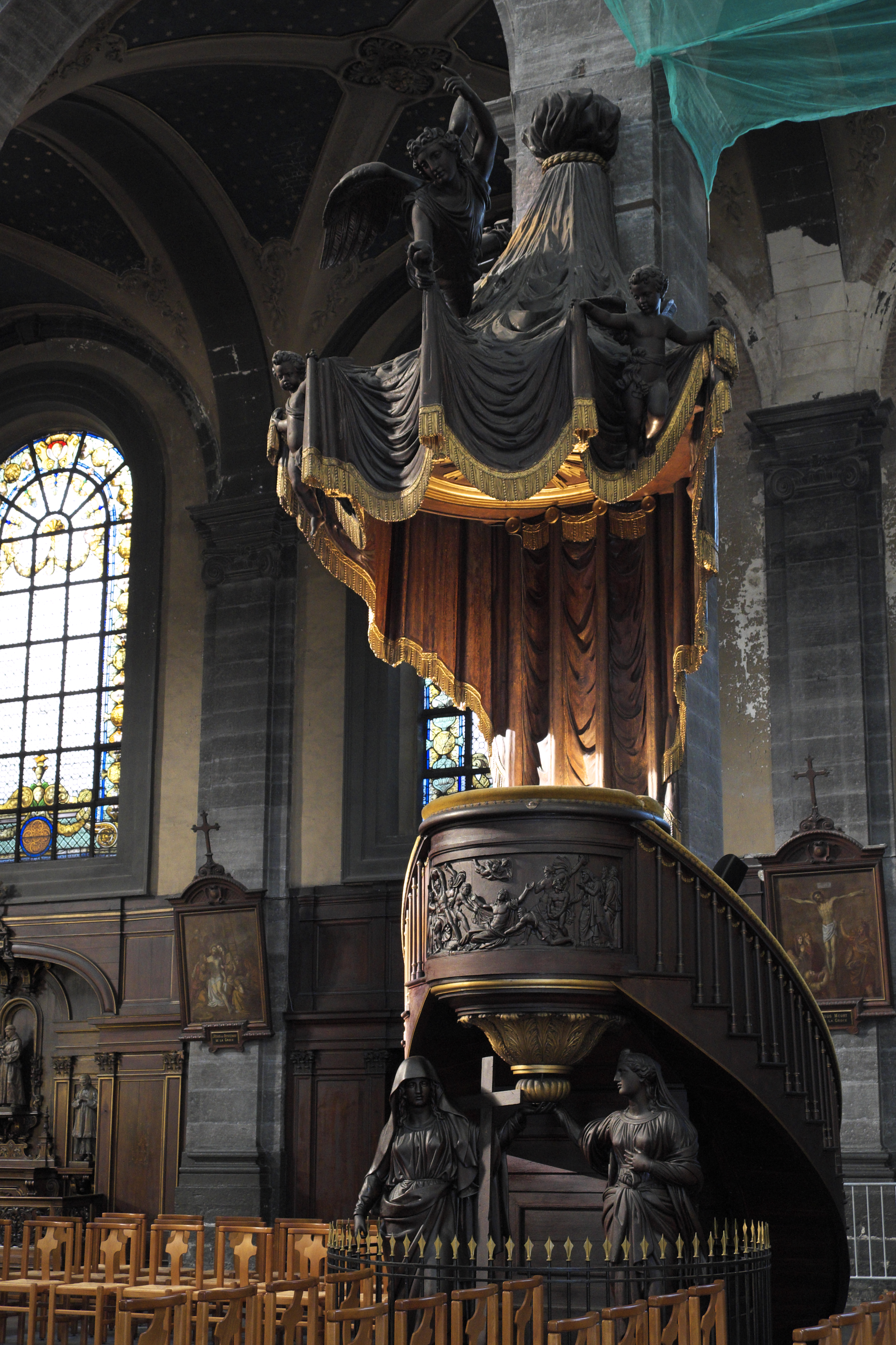 Katholische Kirche Saint-Étienne in Lille im Département Nord (Hauts-de-France/Frankreich), Kanzel